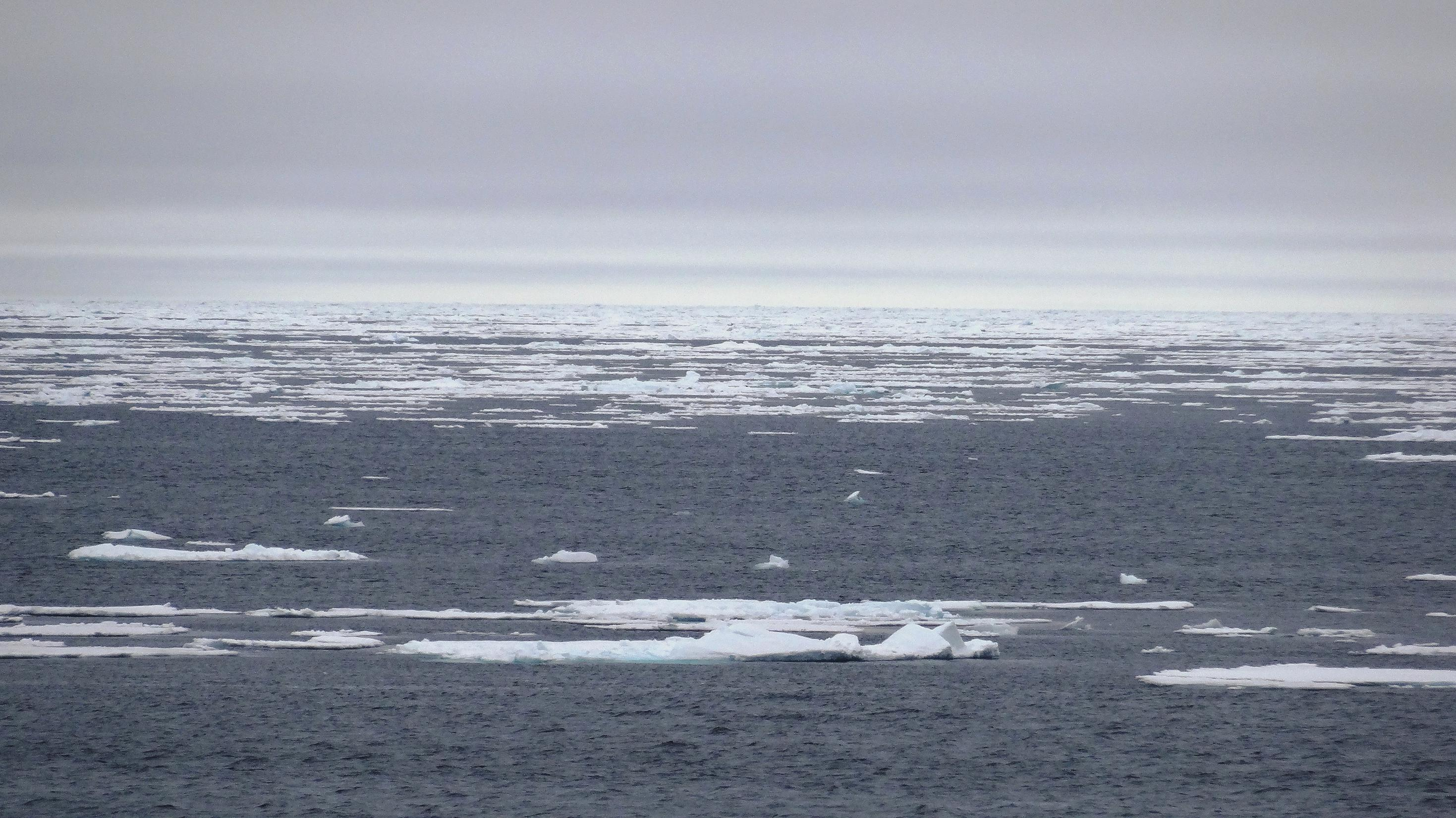 Bevenn ar vorskorneg e Meurvor Arktika, 80° 6' ledred norzh, e gwalarn Spitsberg (Svalbard - Norvegia), da vare an diglerañ pe diloc'h, d'an 12 a viz Gouere 2014